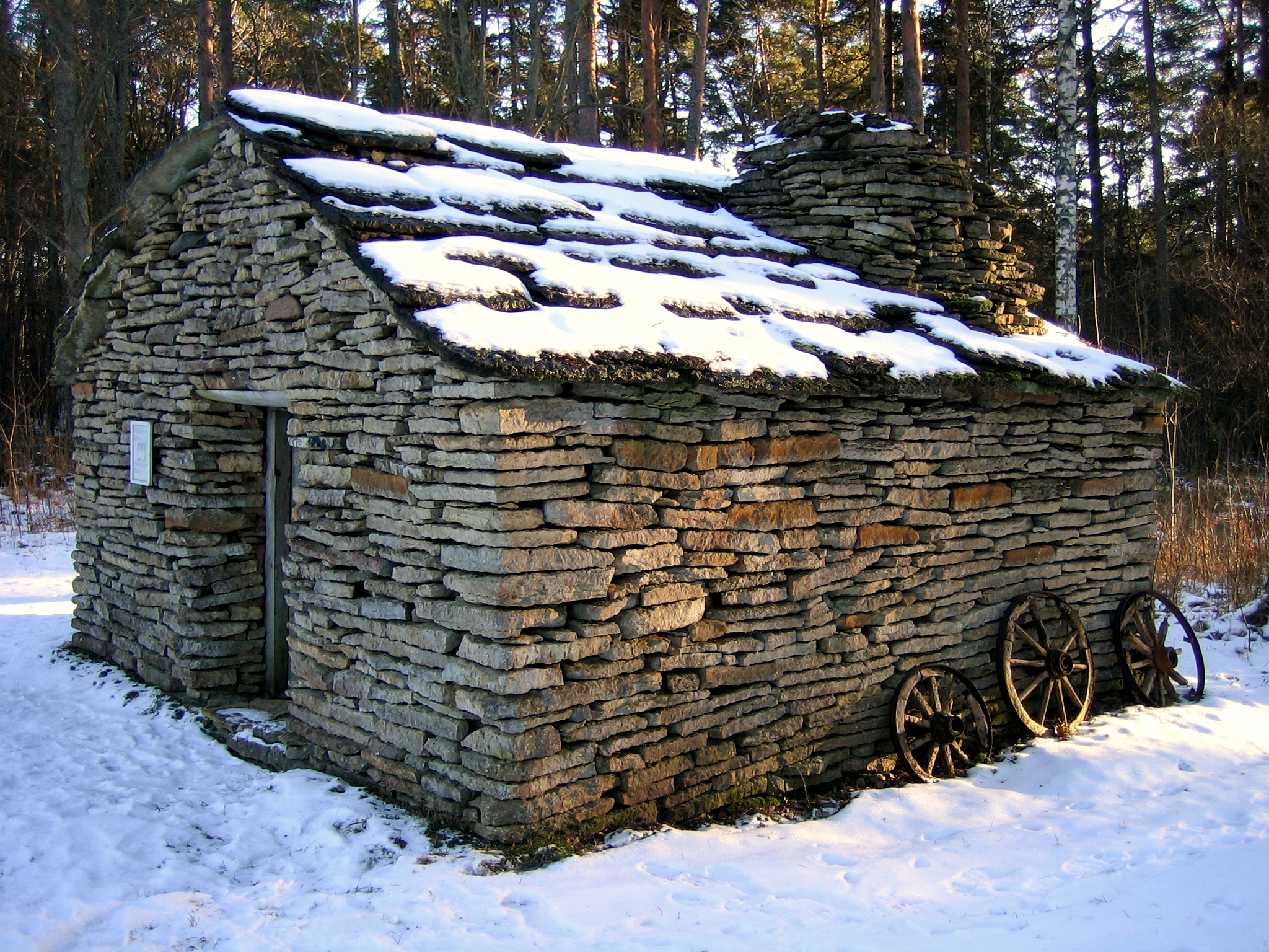 Sepikoda Eesti Vabaõhumuuseumis. Sepikoda pärineb Oluva talust Kahala külast, Kuusalu kihelkonnast Ehitatud 18. sajandi alguses. Muuseumis alates 1964.